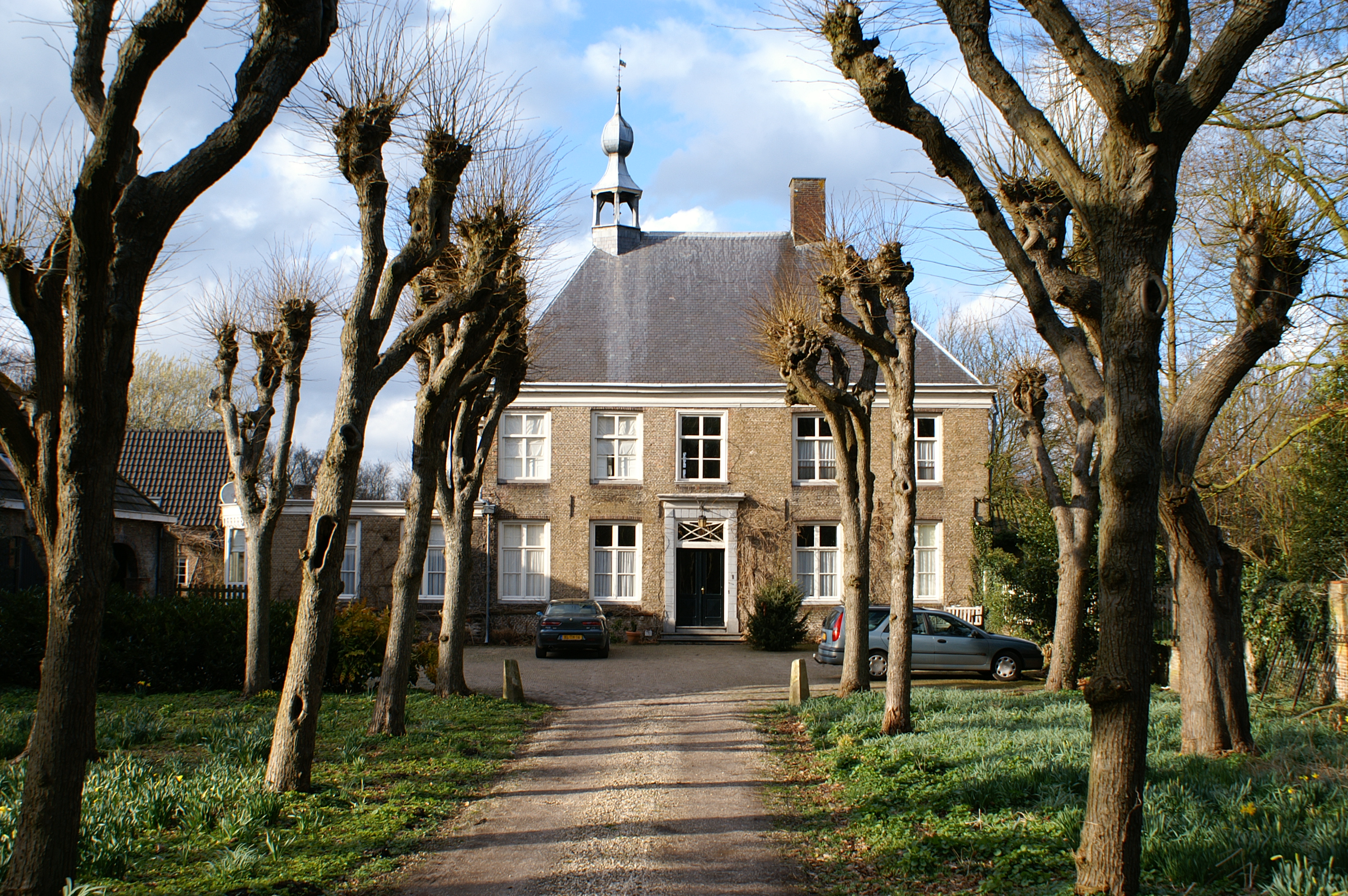 Jachtslot Haanwijk te Haanwijk, Sint-Michielsgestel.